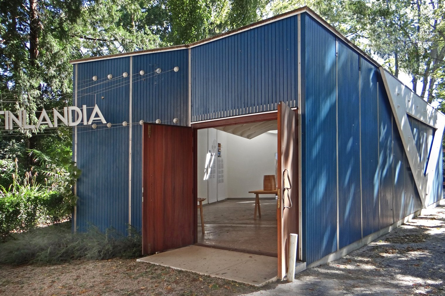 Le pavillon de la Finlande d'Alvar Aalto vu de l'extérieur Re-Création Anssi Lassila, OOPEAA - Bureau de l'Architecture Commissaire: Juulia Kauste. Ce petit pavillon en bois, aux couleurs de la Finlande, a été conçu par le grand architecte-designer finlandais Alvar Aalto en 1955-1956. Il devait être utilisé temporairement par la Finlande en attendant la construction du pavillon des pays nordiques mais il est resté ouvert depuis cette date car il est devenu un symbole. Autre photo du pavillon de la Finlande (biennale 2012)